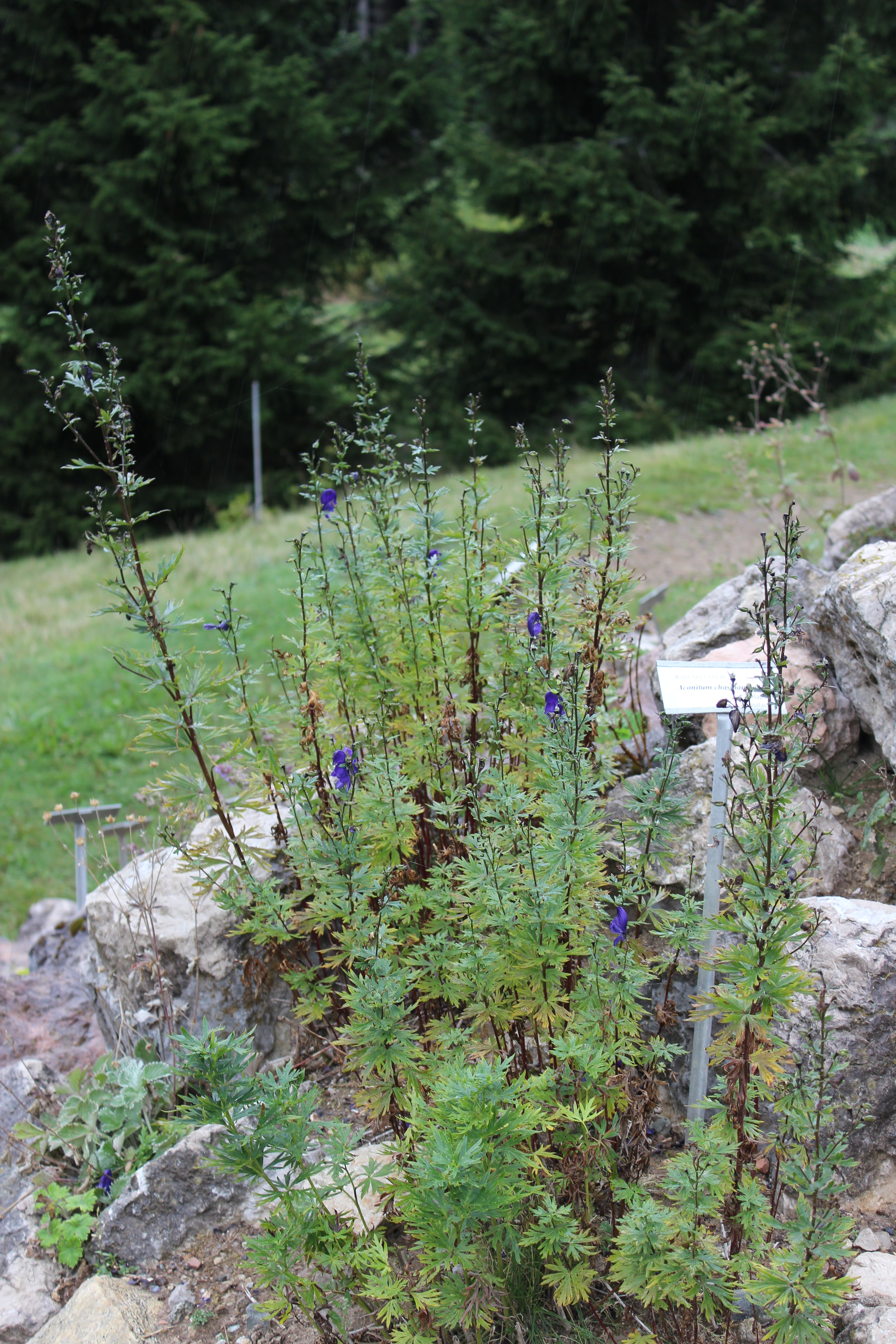 Aconitum chasmanthum im Botanischen Alpengarten Viote